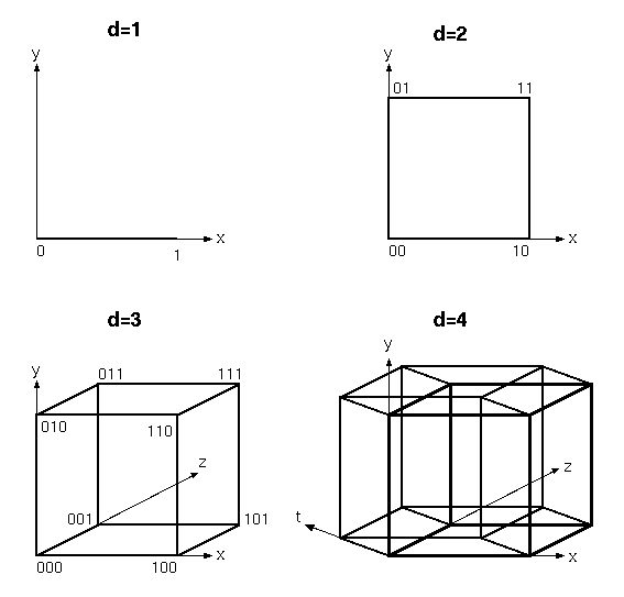 Hypercube mit d=1 bis d=4